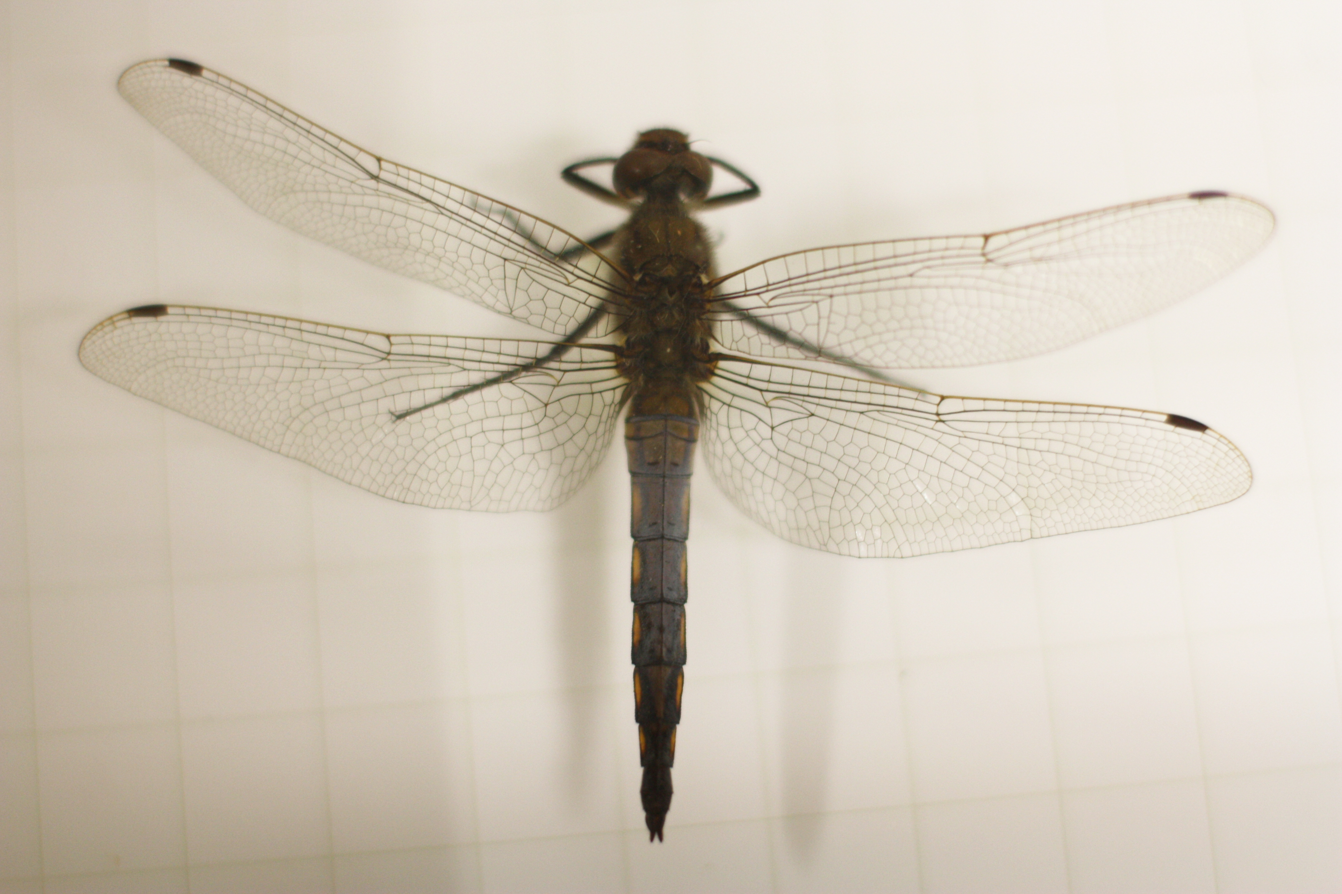 Naturkundliche Sammlung Übermaxx Überseenuseum Bremen; Schmetterlinge und andere